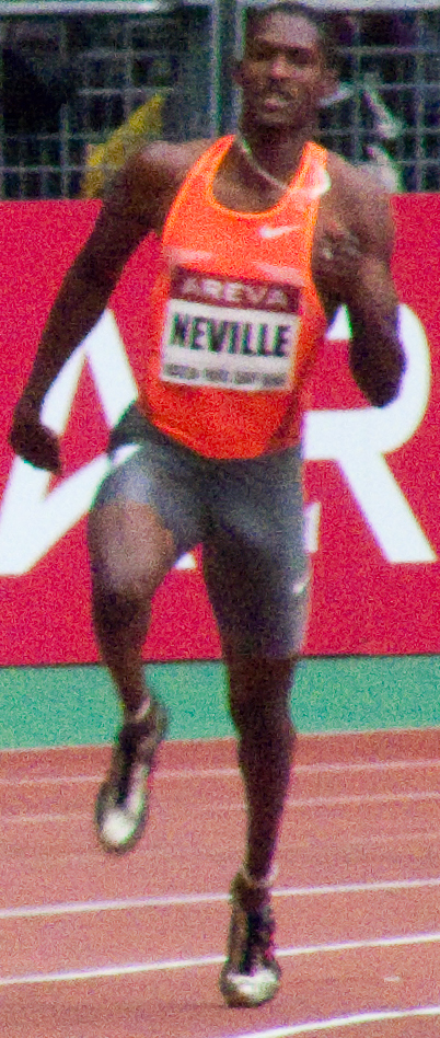 David Neville (USA) sur le 400 m du Meeting Areva 2009 à Saint-Denis.